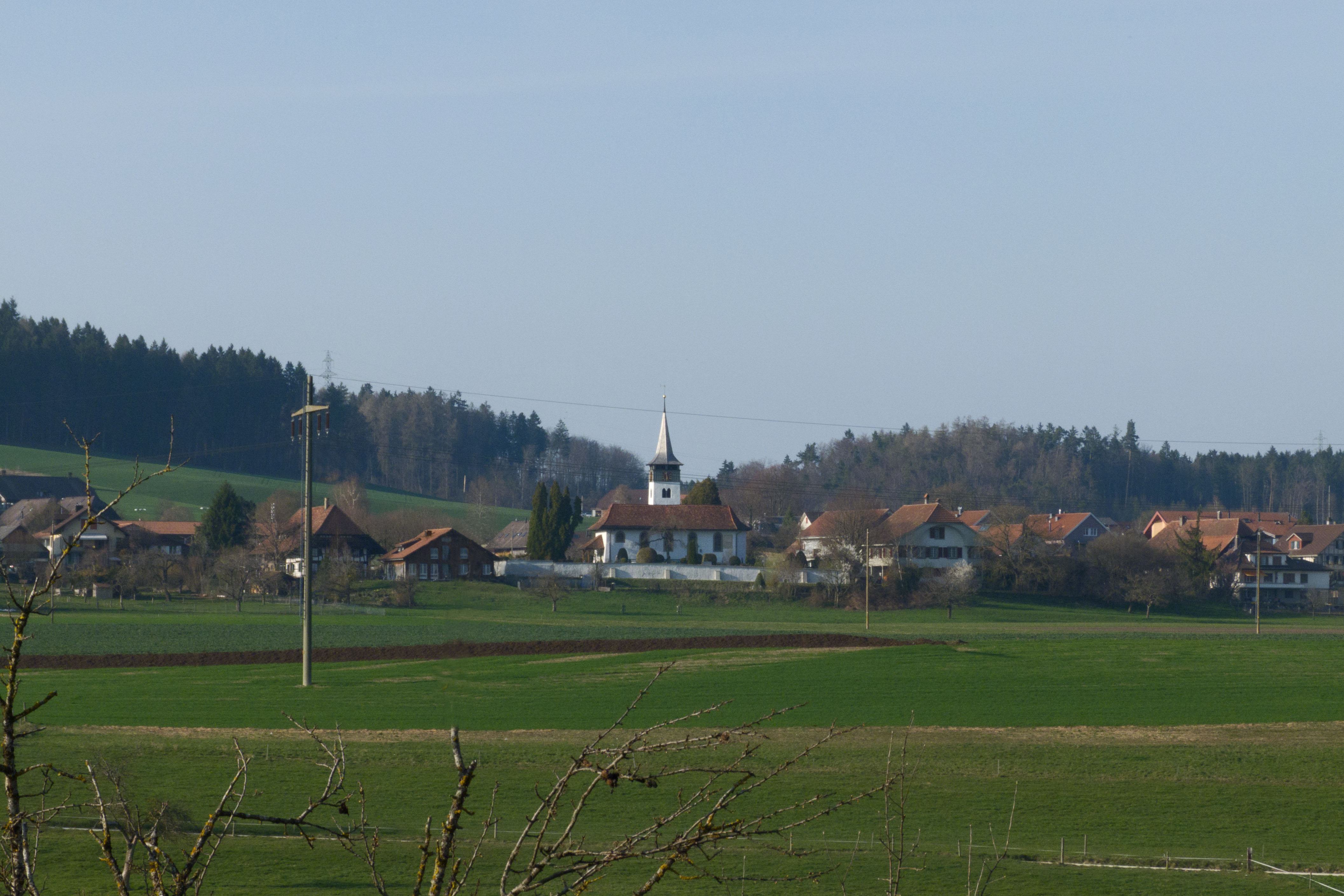 Kirchlindach von Süd